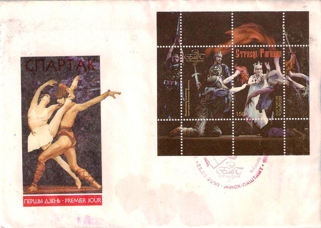 Марка "Сцена из спектакля «Страсти» («Рогнеда»)" на конверте Первого дня (Premier Jour) со специальным гашением. На конверте изображена сцена из балета "Спартак". Художник - А. Гапіенка (бел.яз). Тираж 5000.